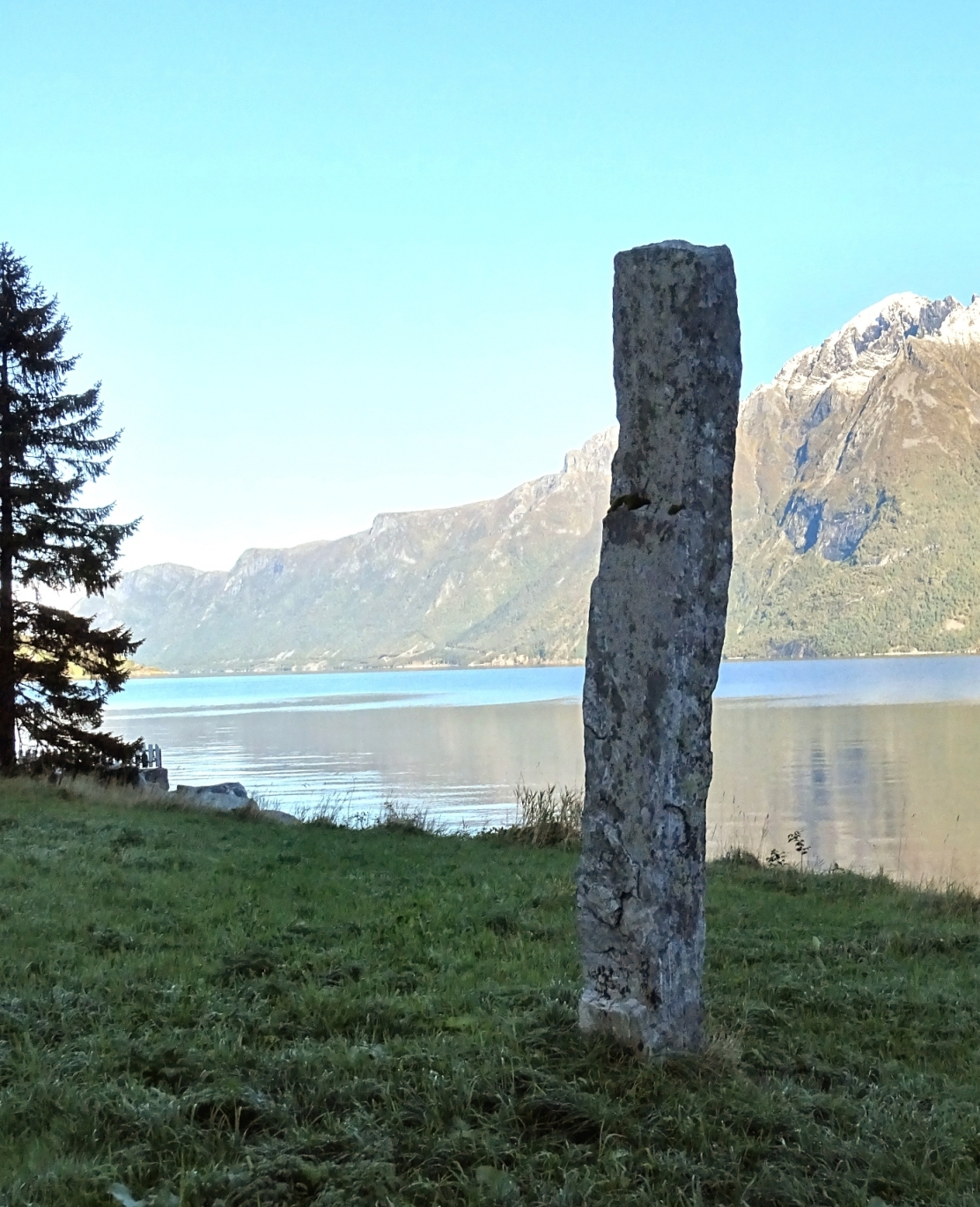 Bautastein på Store Standal i Ørsta. Steinen blir kalla St. Olavs pil.